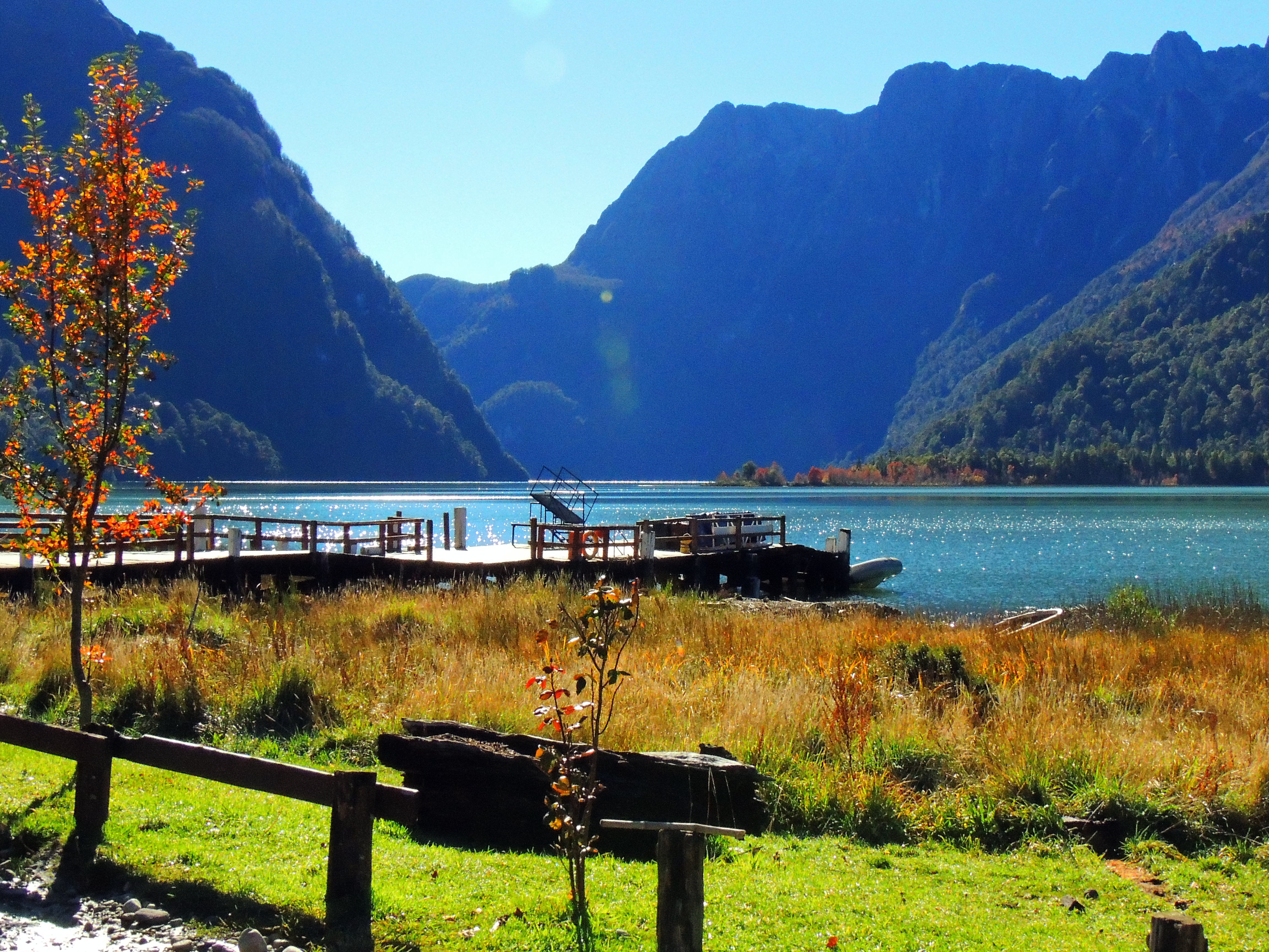 Lake Frías, Río Negro Province, Argentina